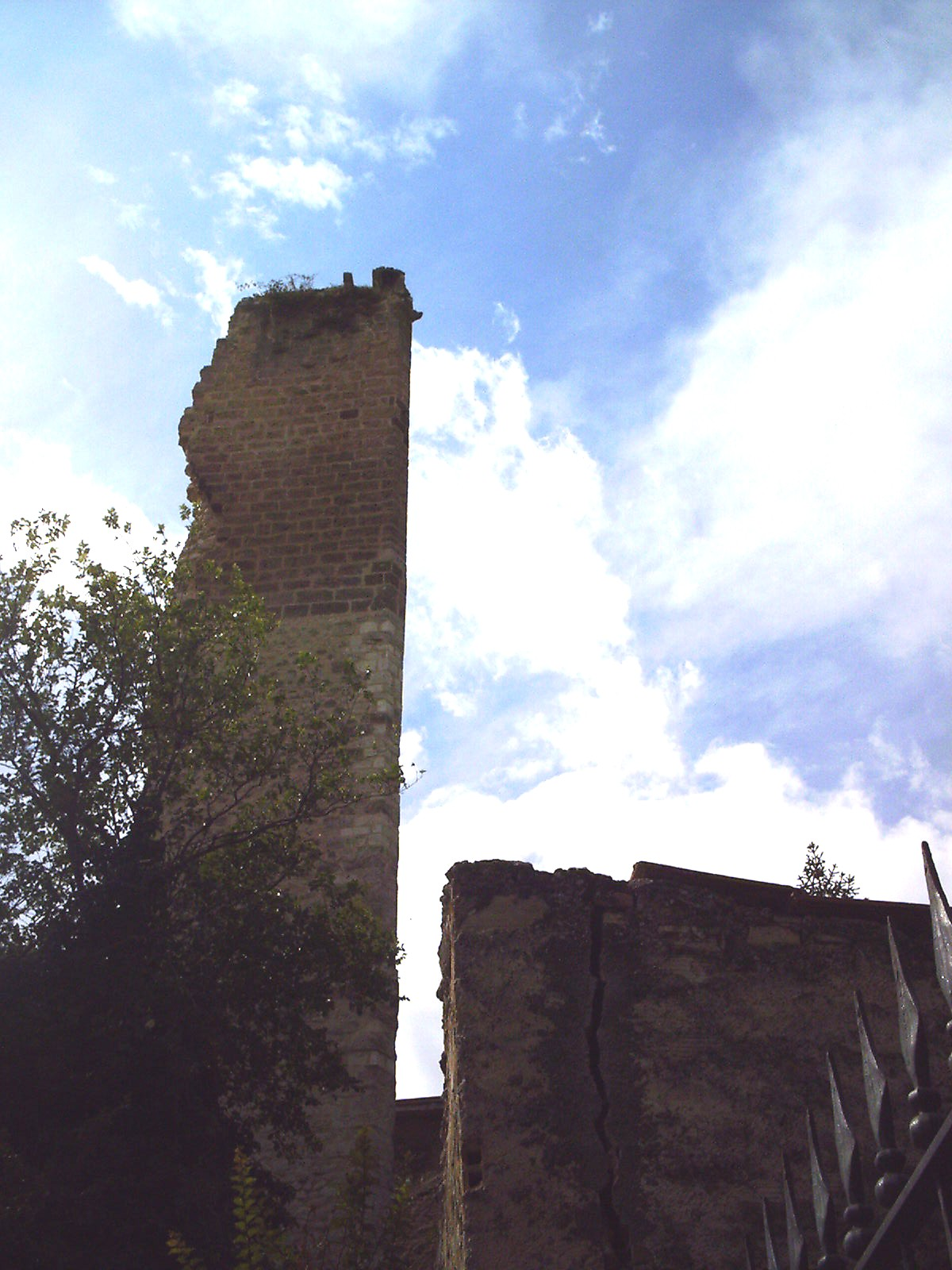 Rudere di castello di Anversa degli Abruzzi